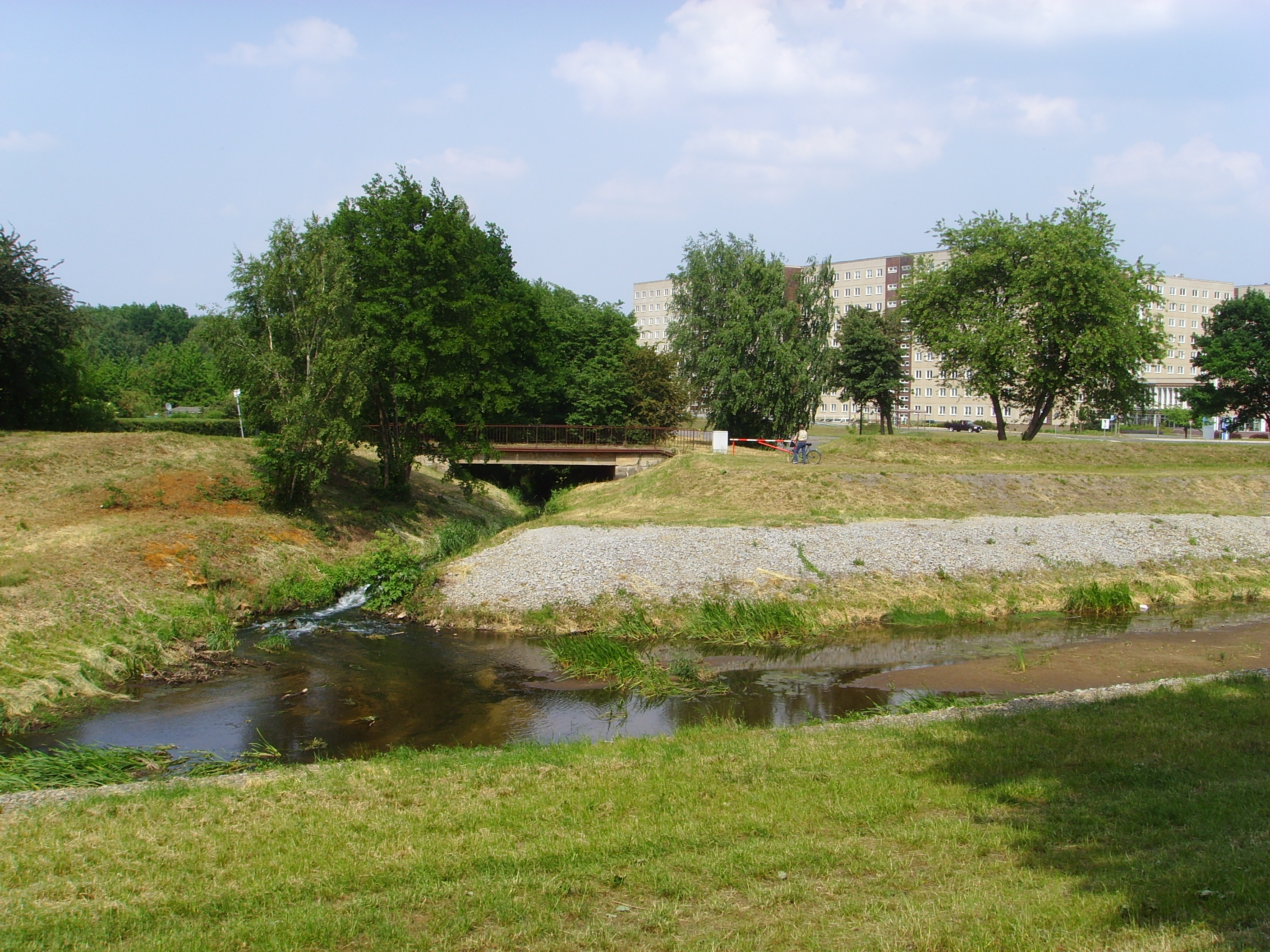 Einmündung der Rainitza in die Schwarze Elster im Senftenberger Stadtteil Buchwalde; im Hintergrund das Verwaltungsgebäude der LMBV